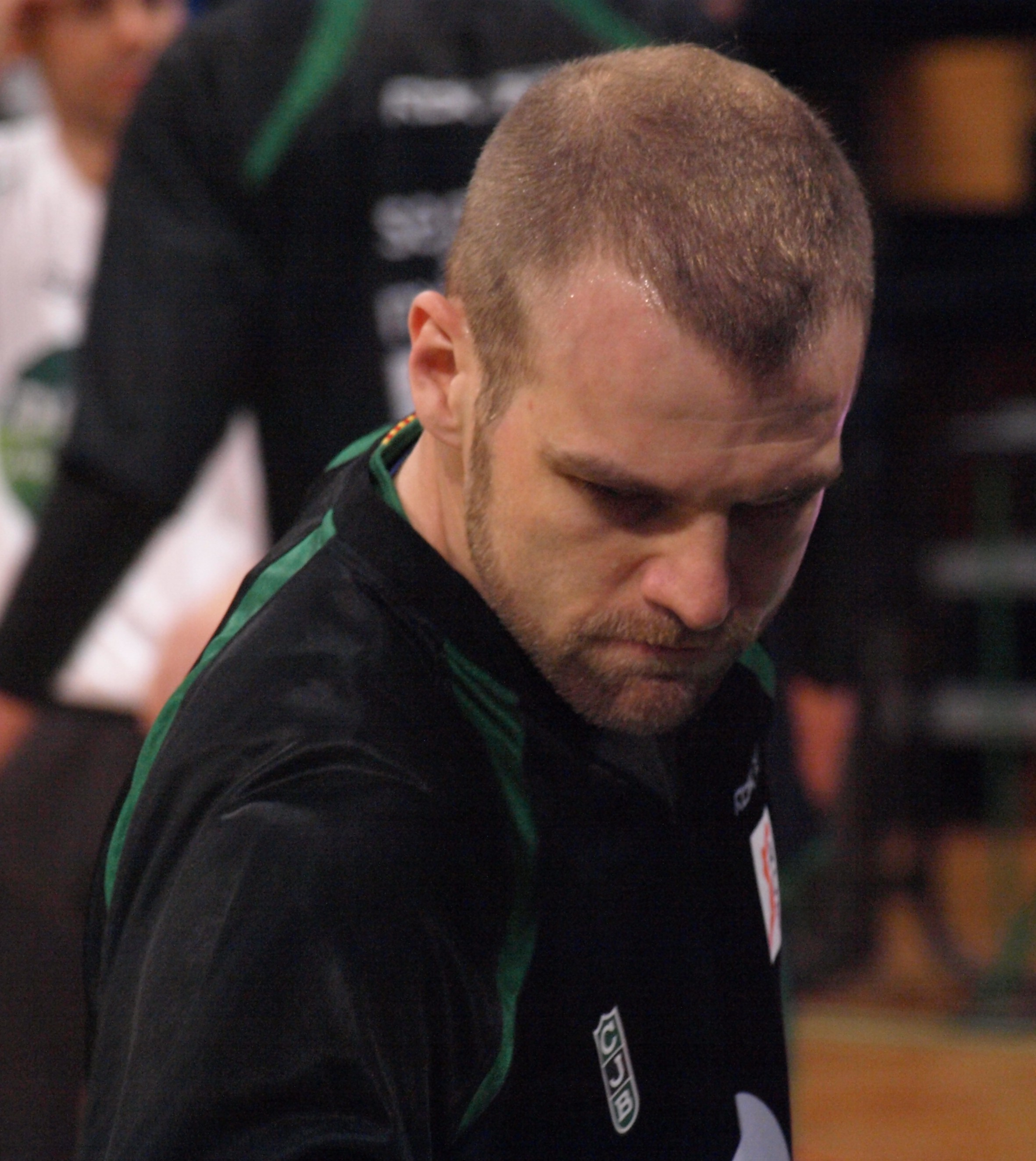 Ferrán Laviña en el Olímpico de Badalona.